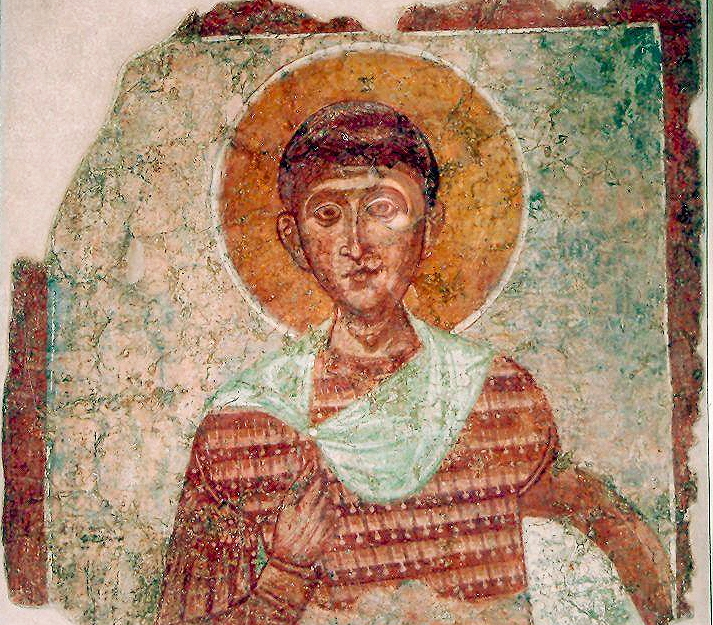 Фрески от "Свети Никола" в Мелник 12 - 14 век